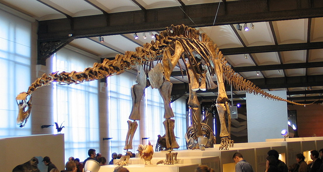 Kaatedocus at the Museum voor Natuurwetenschappen in Brussels, Belgium